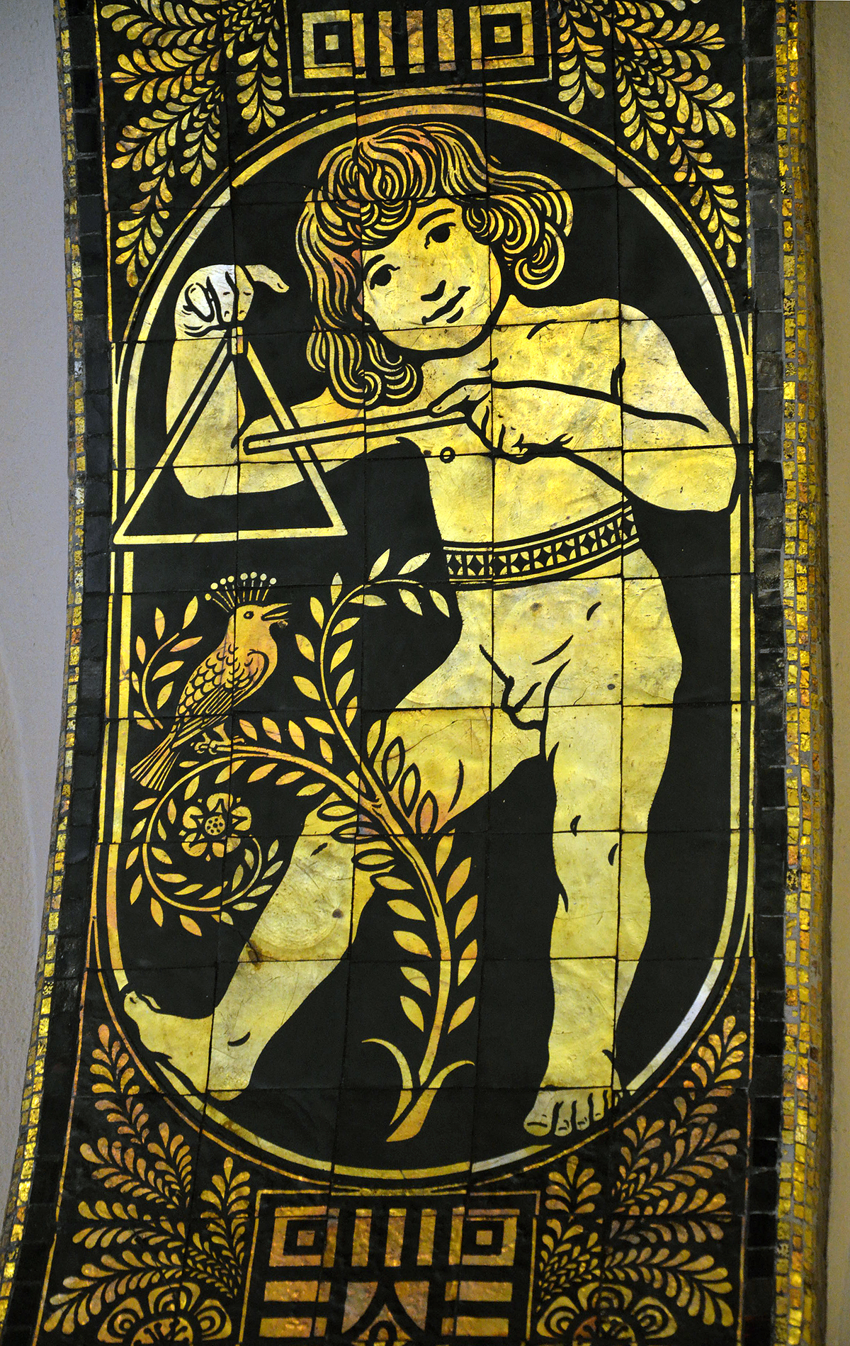 Detail aus einem der 1911 für das Neue Rathaus in Hannover von Richard Schlösser geschaffenen Goldmosaikbögen, hier ein nackter Knabe beim Musizieren mit einer Triangel, begleitet von einem Vogel ...